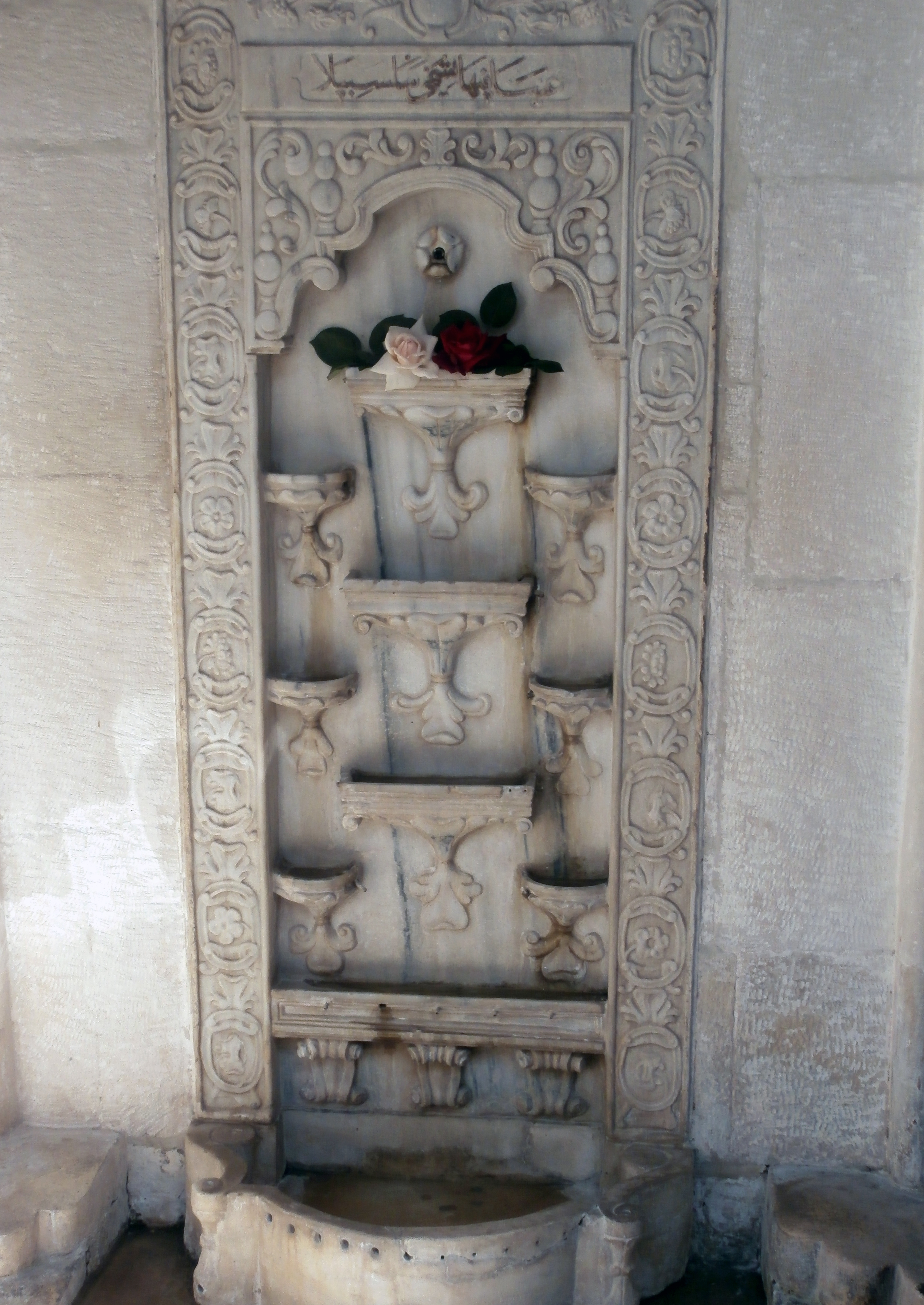 Фонтан слёз в Бахчисарае